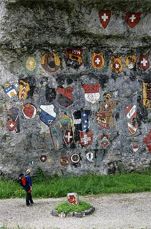 Wappenfels im Chessiloch (Grellingen)